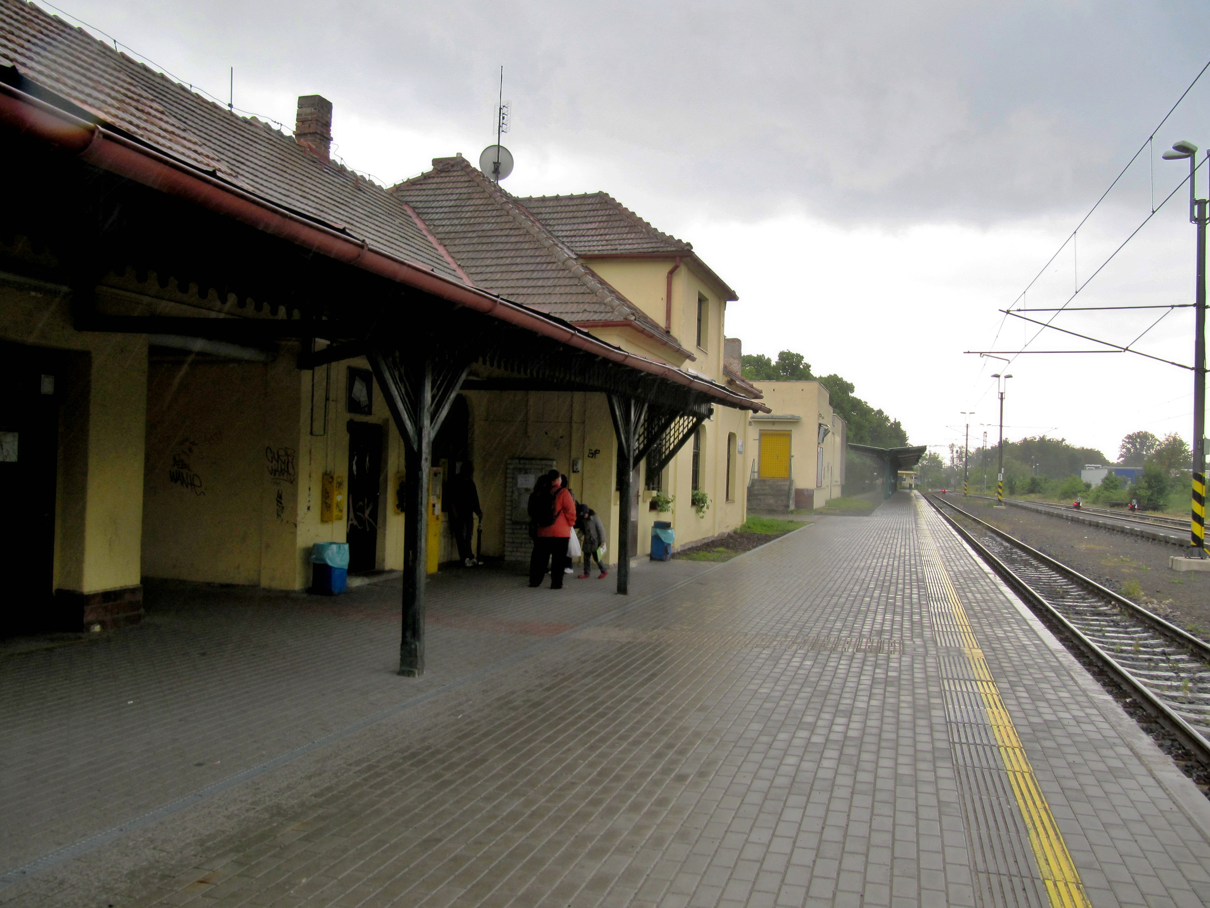 Milovice, nádraží